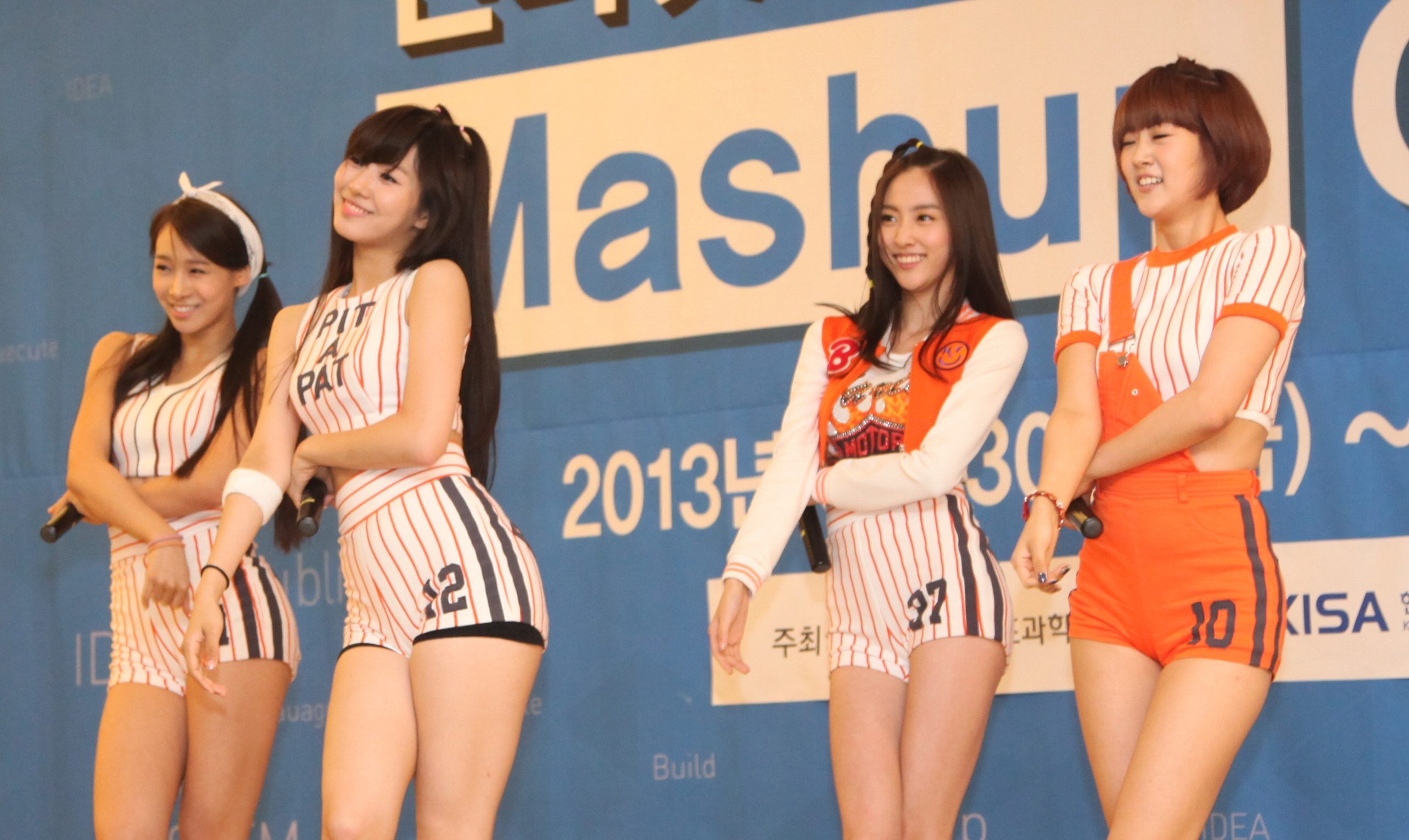 2013년 8월 30~31일 무박2일간, 더케이서울호텔에서 진행된 국내 최대 해커톤 프로그램.